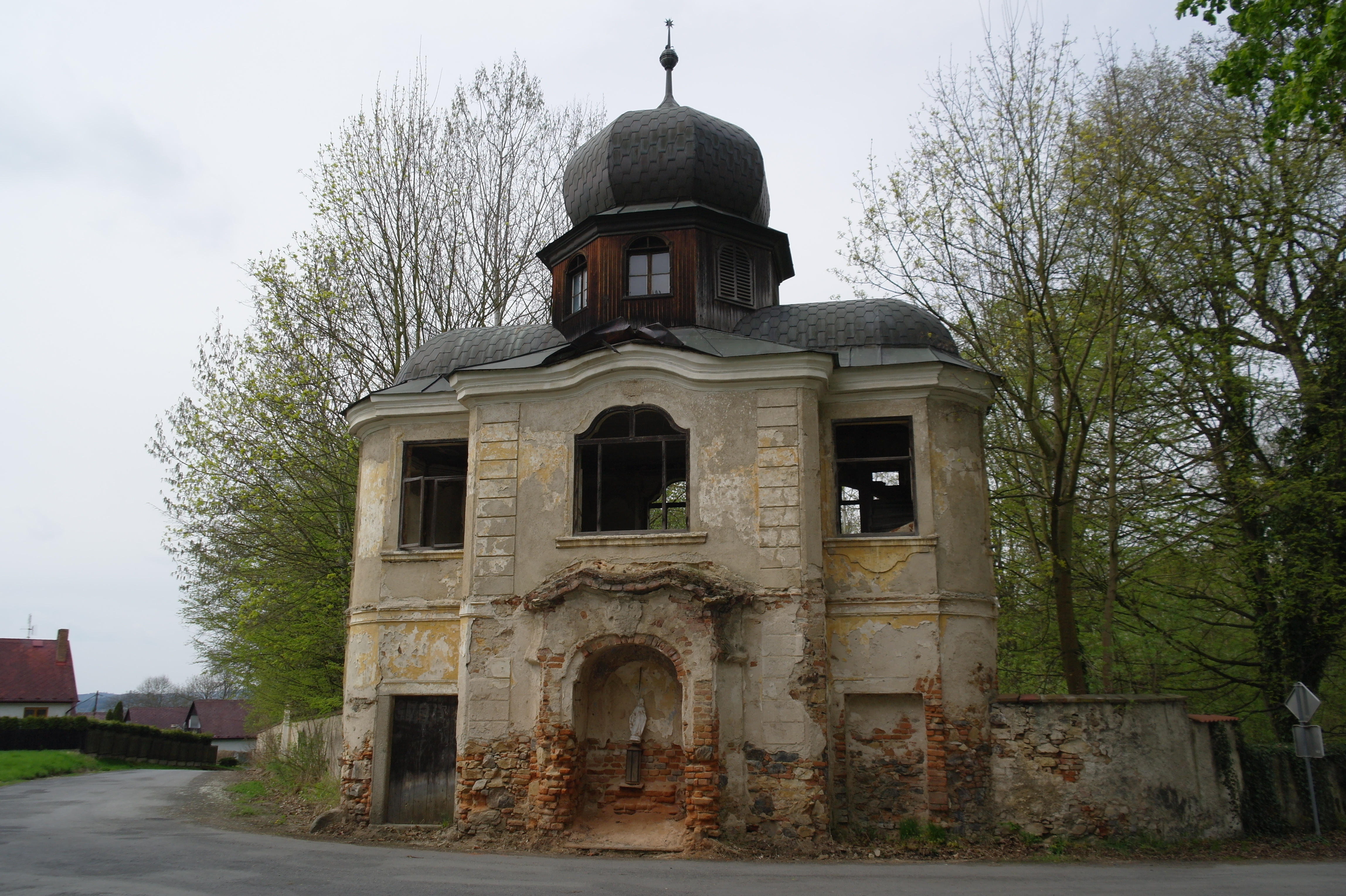 Otín